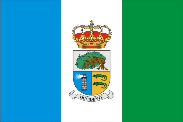 Bandera de La Frontera (El Hierro, Santa Cruz de Tenerife, España)